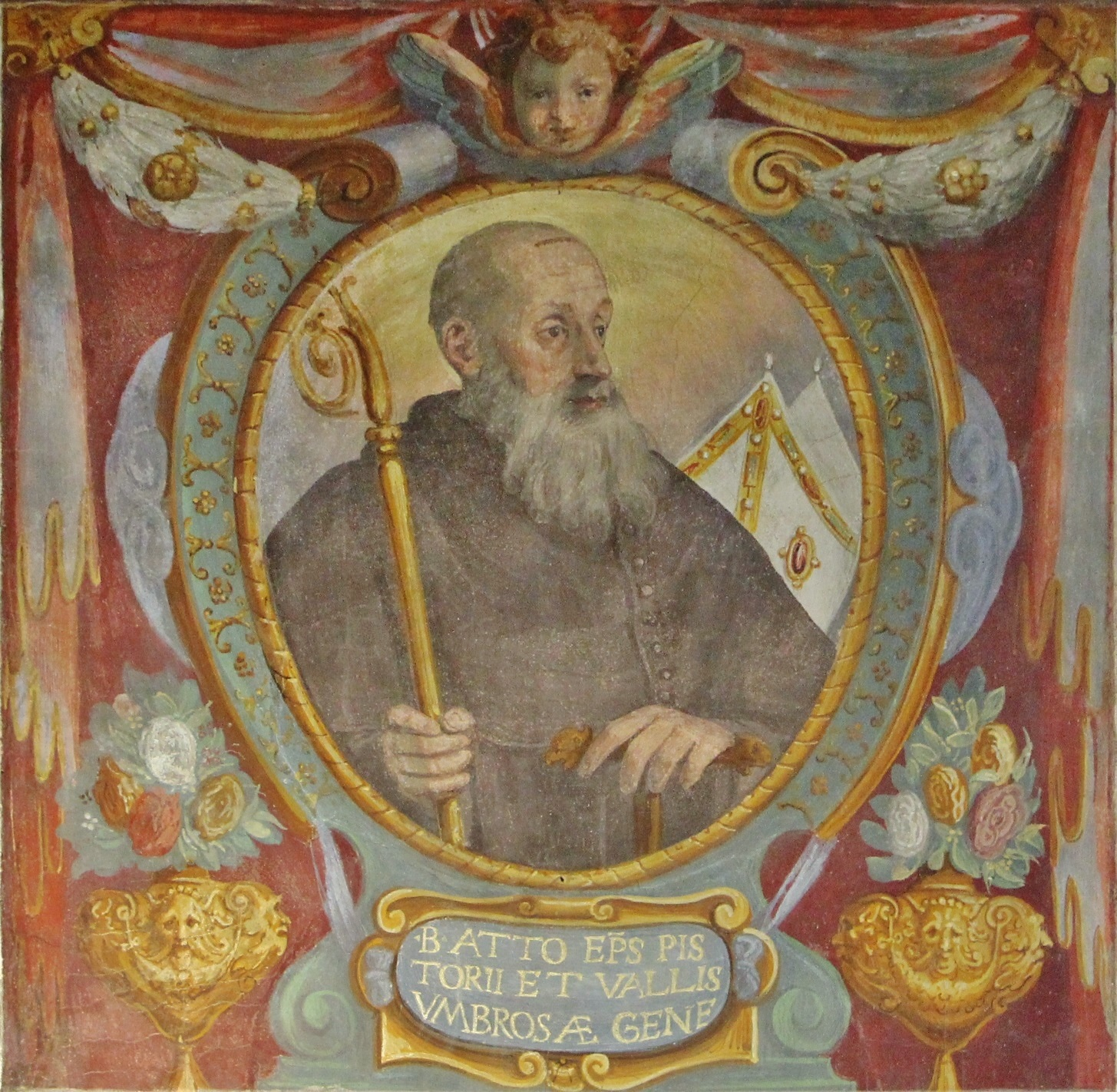 San Bartolomeo a Ripoli